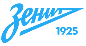 Official Logo of FC Zenit Saint Petersburg 2013 // Эмблема футбольного клуба «Зенит» Санкт-Петербург